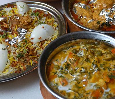 Hyderabadi Biryani, an Indian meat and rice dish.